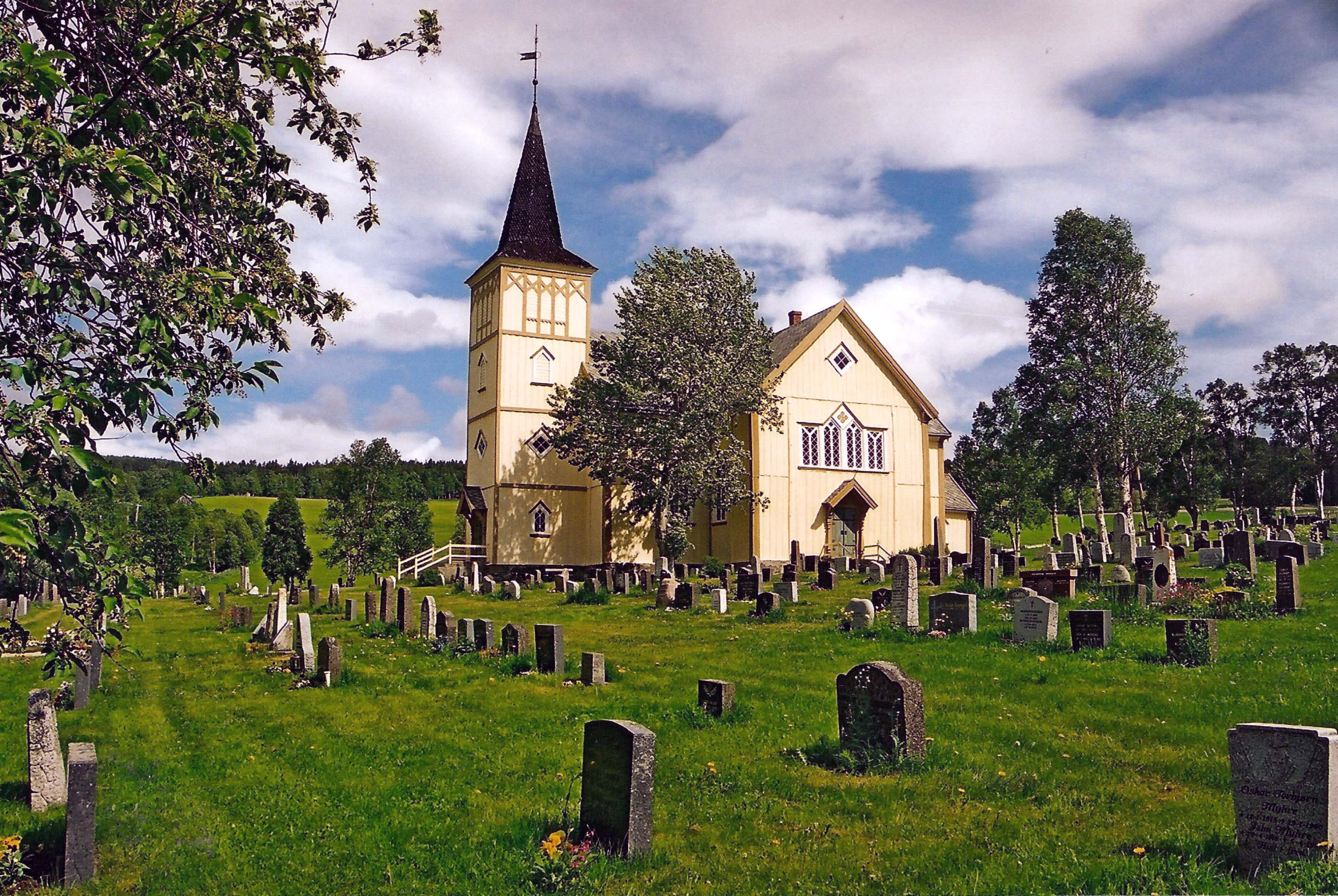 Forsommer ved Os kirke. Foto av Thor Helge Sømåen